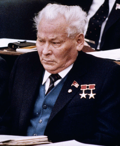 Retrato de Konstantín Ustínovich Chernenko, Secretario General del Comité Central del Partido Comunista de la Unión Soviética.